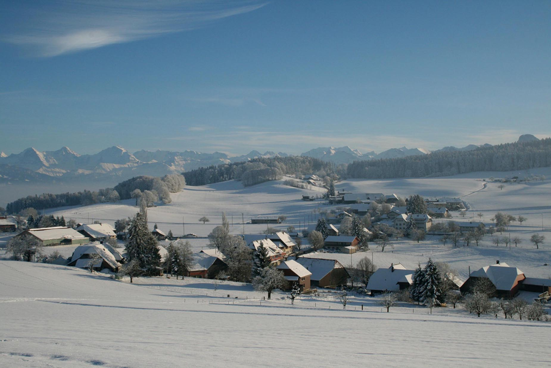 Niedermuhlern im Winter